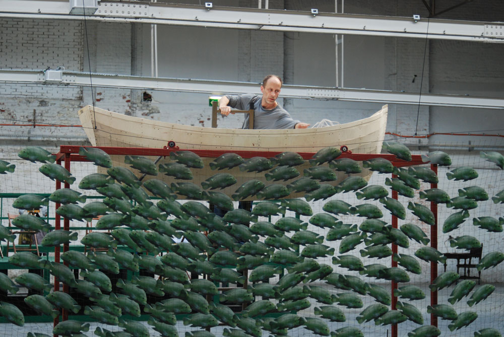 Jakob Scheid beim Bau eines Bühnenbilds für das sirene Operntheater